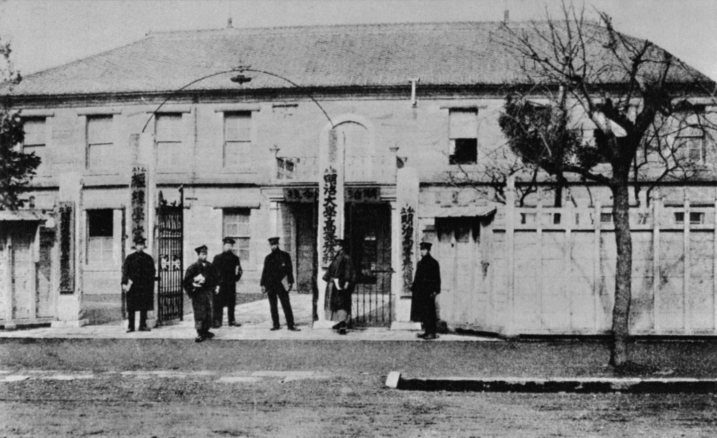 1904年頃の明治大学錦町校舎